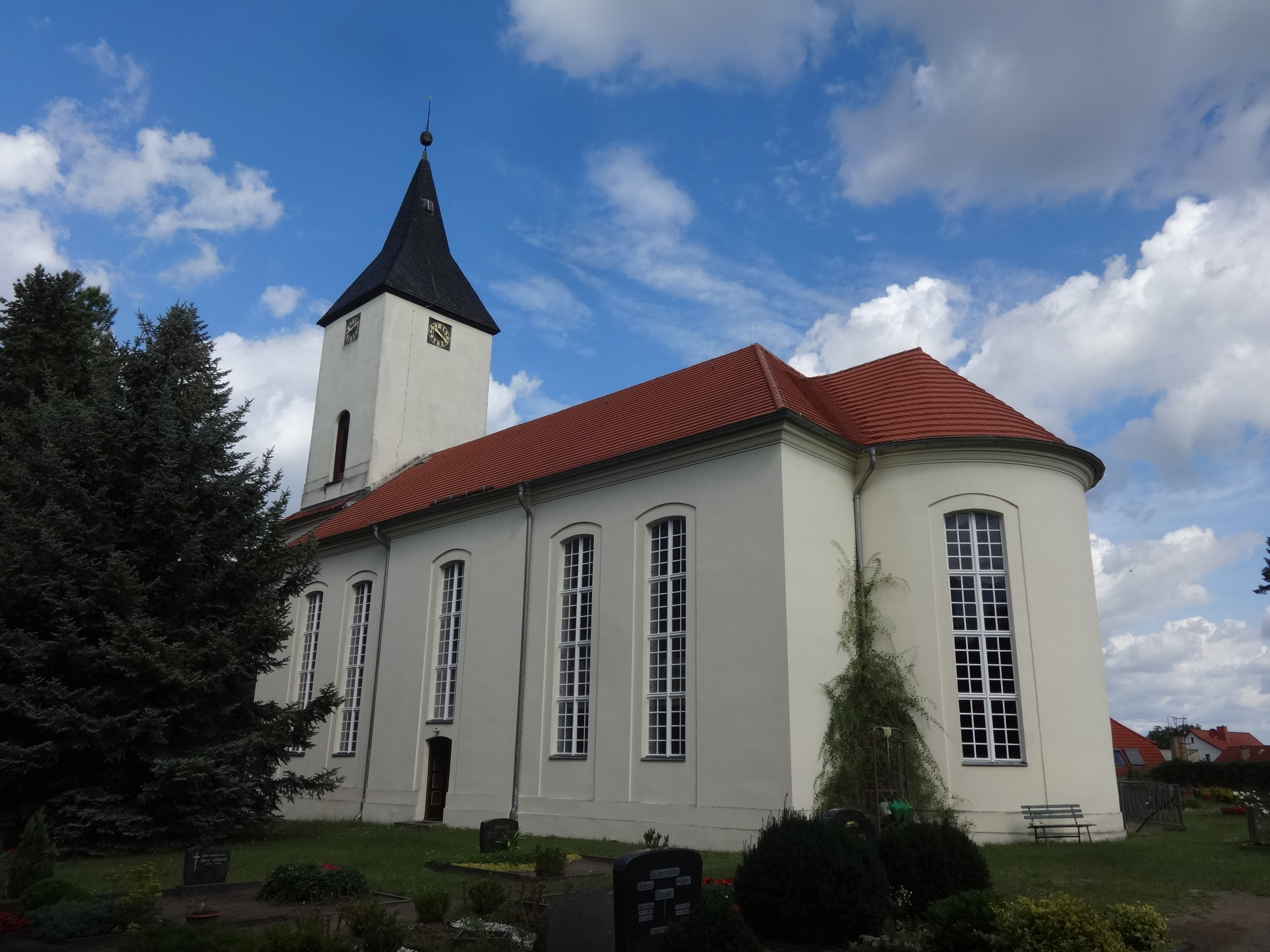 Die Dorfkirche in Sperenberg entstand in den Jahren 1752 und 1753 nach Plänen des Landbaumeisters Georg Friedrich Berger. Im Innern befinden sich zwei Altarleuchter eines Hamburger Reeders aus dem Jahr 1612 sowie ein Holzkreuz des Sperenberger Bildhausers Egon Liebold.